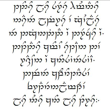 Declaración de los derechos humanos escrito con tengwar